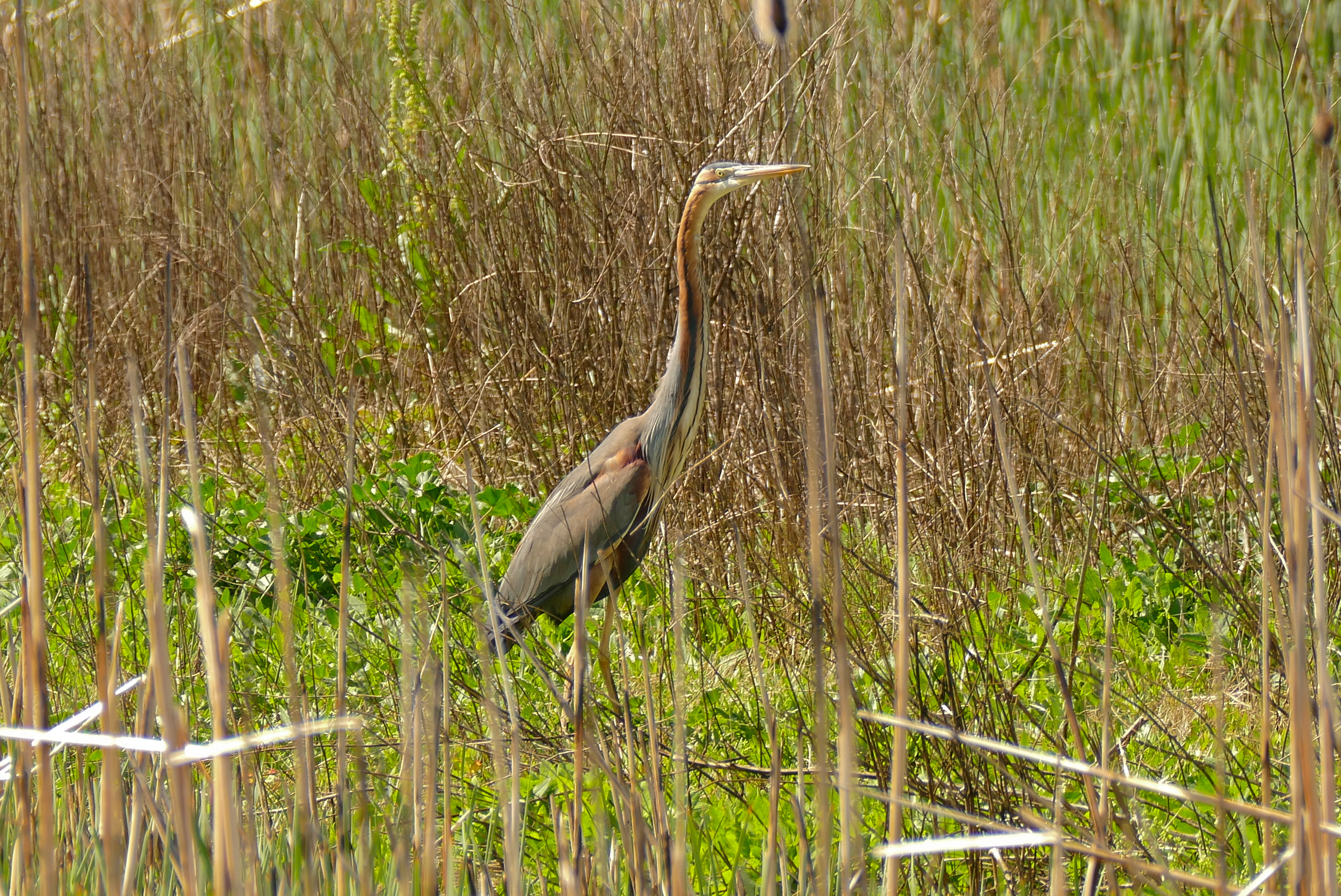 Aguait dels Capons, Estany Europa, Los Aiguamolls del' Empordà, Castelló d'Empúries, Catalunya, SPAIN